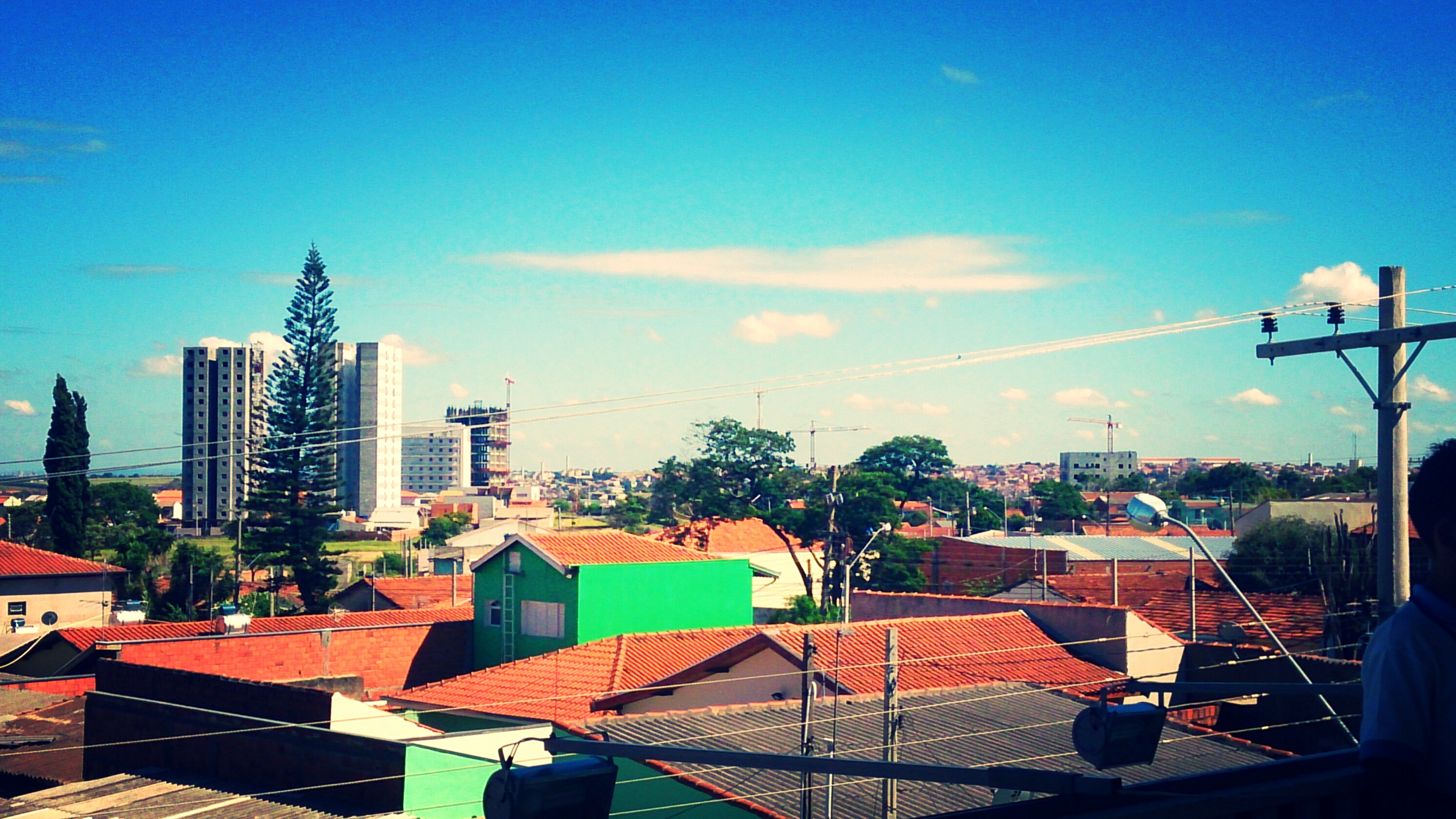 Partial view of Hortolândia, São Paulo, Brazil.